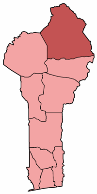 Mappa della diocesi di Kandi, nel Bénin. Lavoro personale, eseguito a partire da questa immagine di Commons. Fonte per i confini delle diocesi: Guida delle missioni cattoliche 2005, a cura della Congregatio pro gentium evangelizatione, Roma, Urbaniana University Press, 2005. Categoria:Chiesa cattolica in Benin